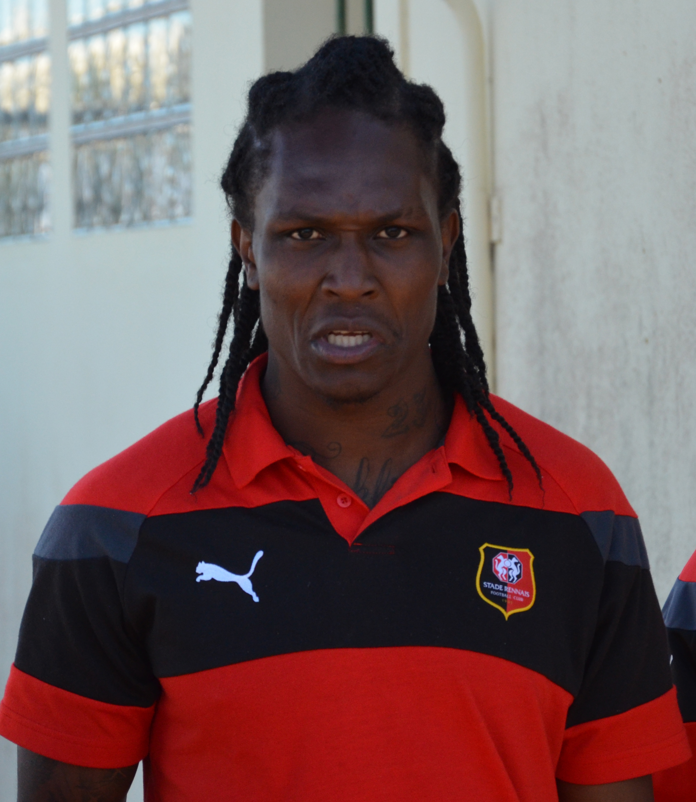 Photographie prise lors du match opposant le Stade rennais à l'USM Alger en match amical au stade Paul-Audrin de Dinard le 16 juillet 2016. Ici, Habib Habibou.